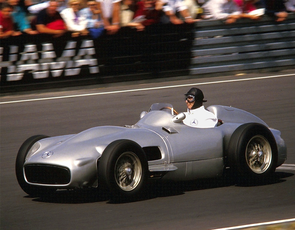 Juan Manuel Fangio im Mercedes W 196 mit 3-l-Motor 1986 beim Oldtimer-GP auf dem Nürburgring